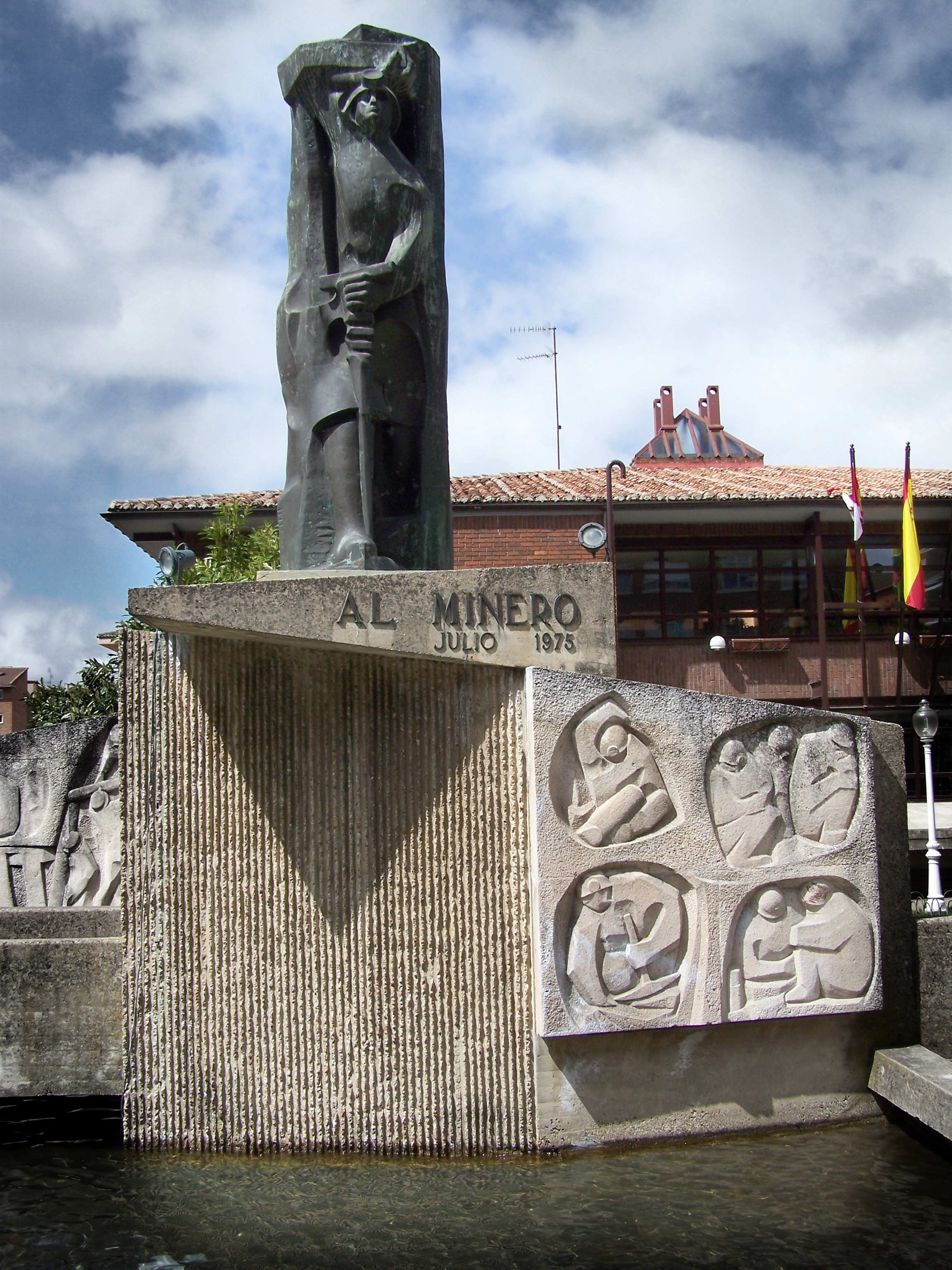 Monumento al minero en Guardo, Palencia (España)